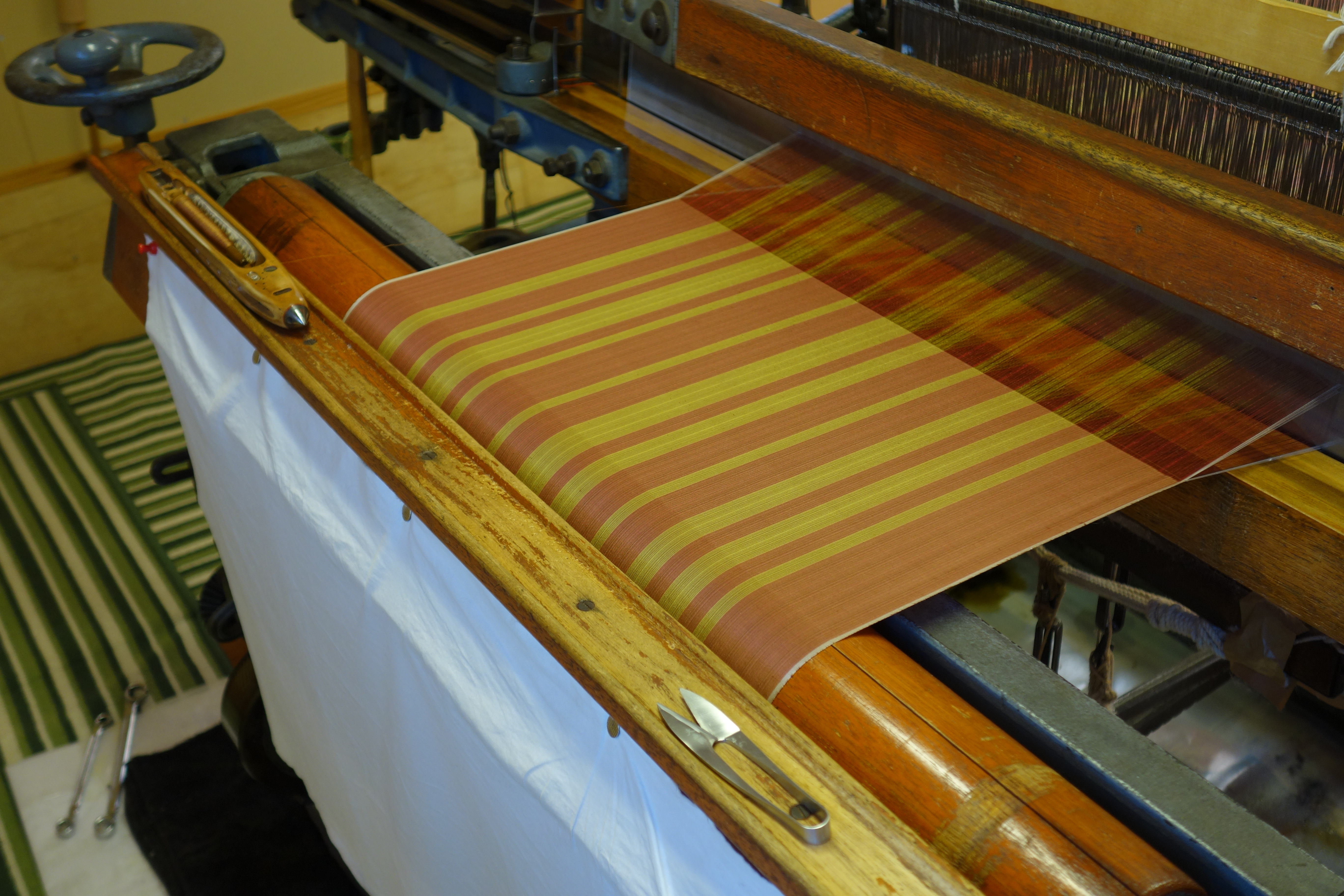 秋田八丈 機織